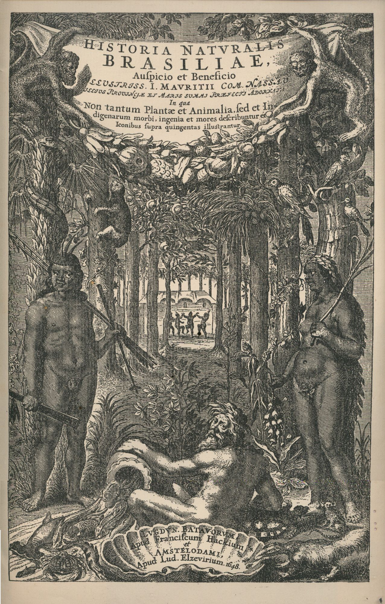 Capa de Historia Naturalis Brasiliae, de Guilherme Piso (Guilielmi Pisonis), dedicate to Johann Moritz Fürst von Nassau-Siegen.